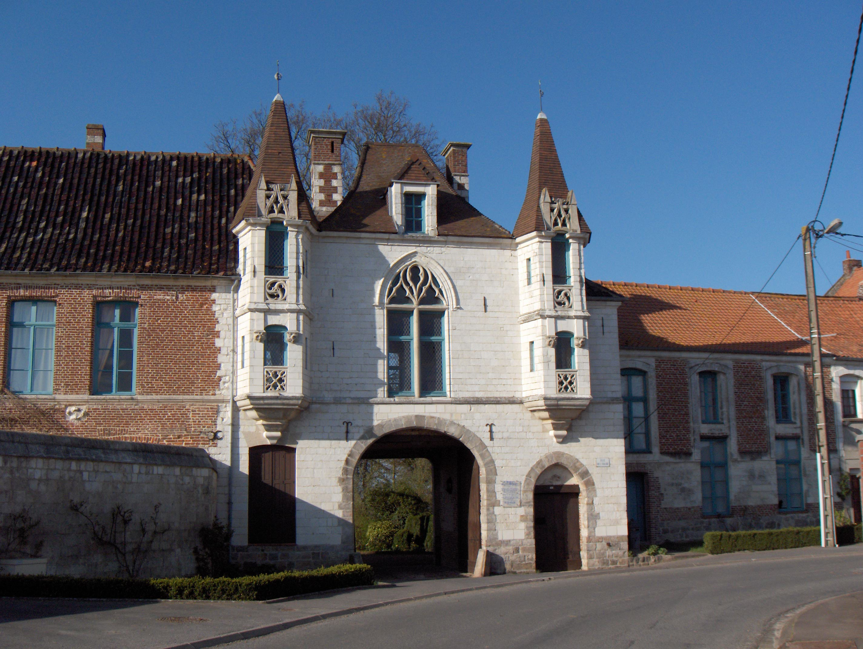 Ham-en-Artois (Frankreich, Dept. Pas-de-Calais), Eingangstor der ehemaligen Benediktinerabtei (1079 gegründet, 1793 aufgehoben). Ursprünglich aus dem 18. Jh., im 19. Jh. neugotisch umgebaut.